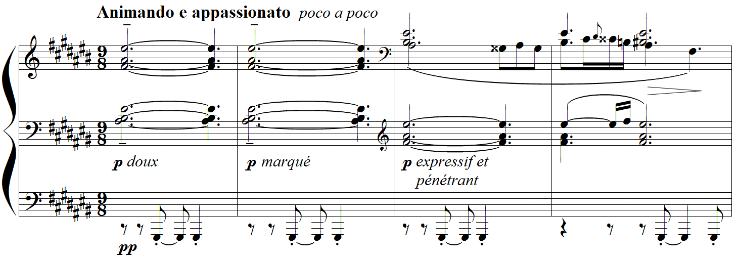 Debussy - Etude "pour les sonorités opposées", mes.38-41